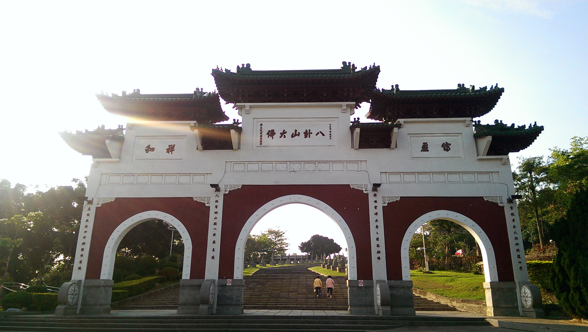 八卦山大佛風景區入口